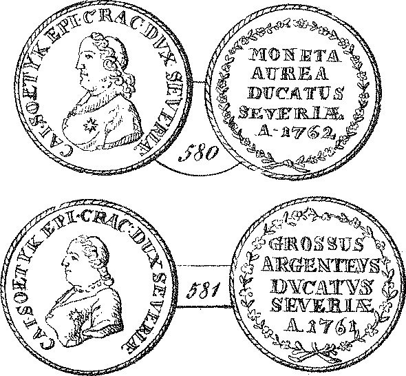 Monety polskie Księstwa Siewierskiego